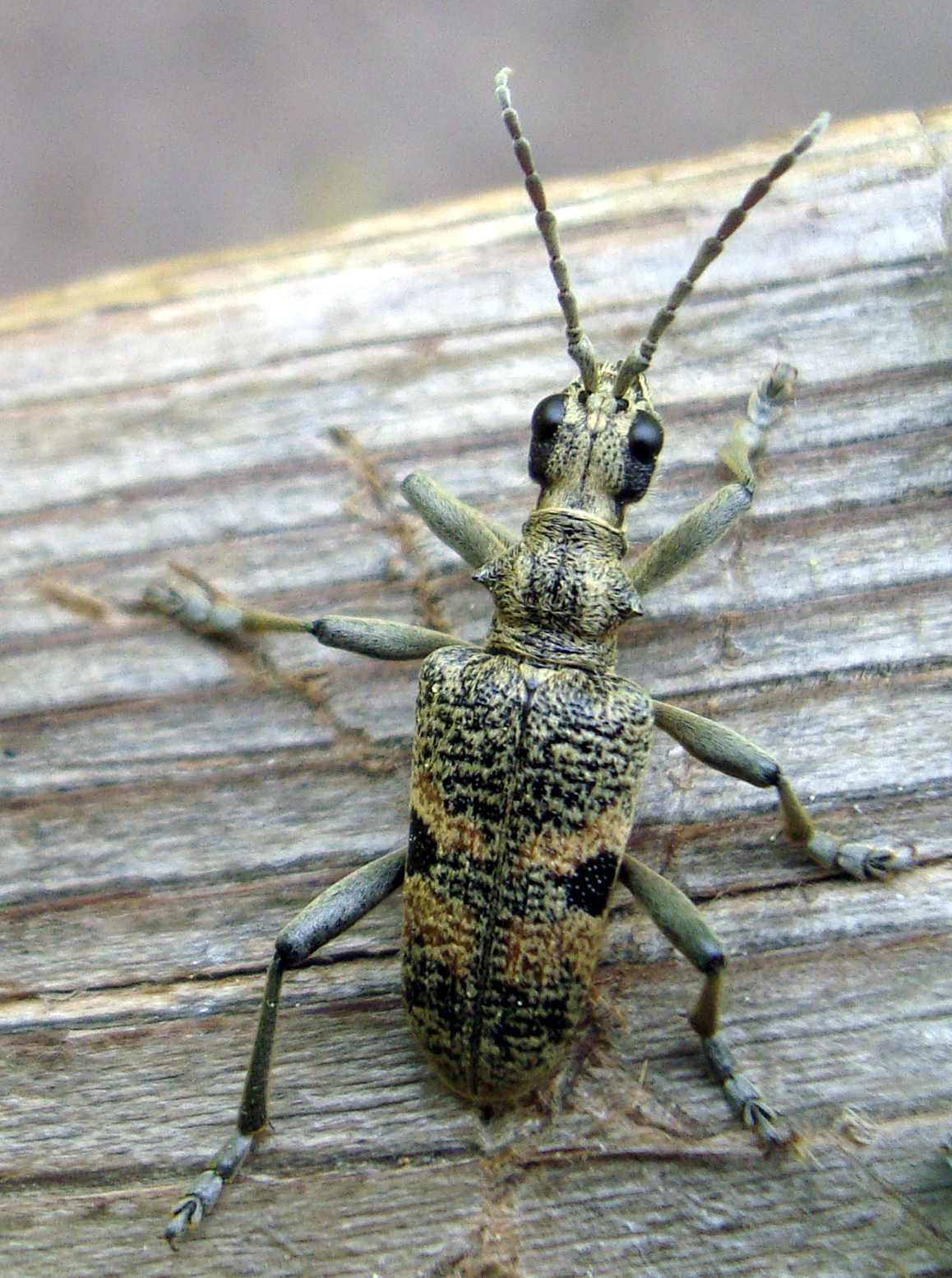 Brouk kousavec hlodavý (Rhagium mordax) z Podkomorských lesů, Česká republika, jižní Morava